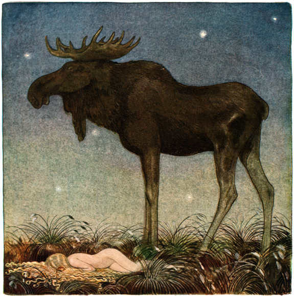 Illustration tirée du conte "Sagan om äldtjuren Skutt och lilla prinsessan Tuvstarr" (Élan longues jambes et princesse Linaigrette) d´Helge Kjellin, réalisée par John Bauer pour "Bland tomtar och troll" (Parmi les gnomes et les trolls), édition 1913.